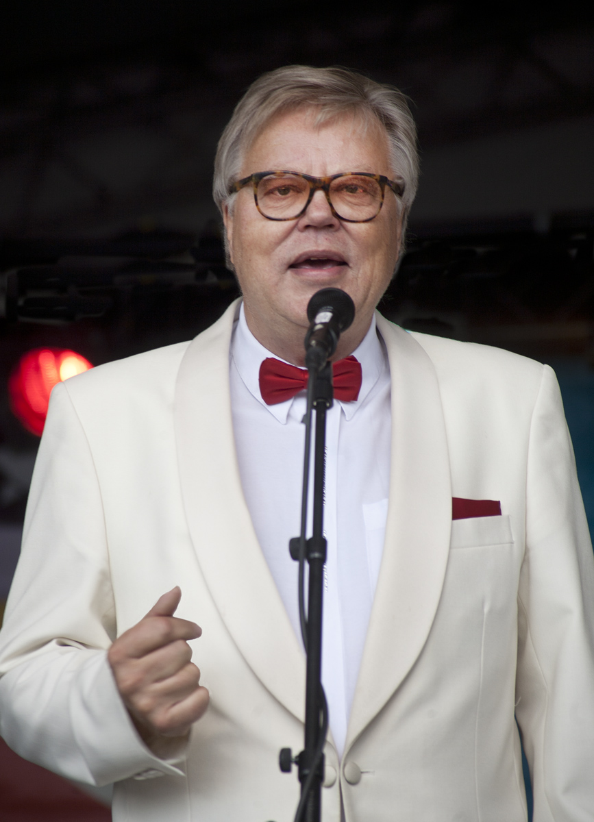 Laulaja ja muusikko Esa Nieminen esiintymässä lauluyhtye Four Catsin kanssa Helsingin Kaisaniemessä Maailma kylässä -festivaalilla 25.5.2014.